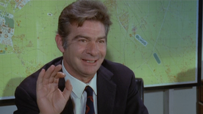 scena dal film Io non spezzo... rompo